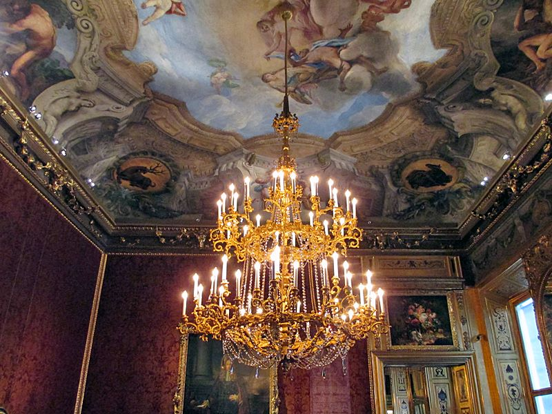 Prunkraum in der Beletage